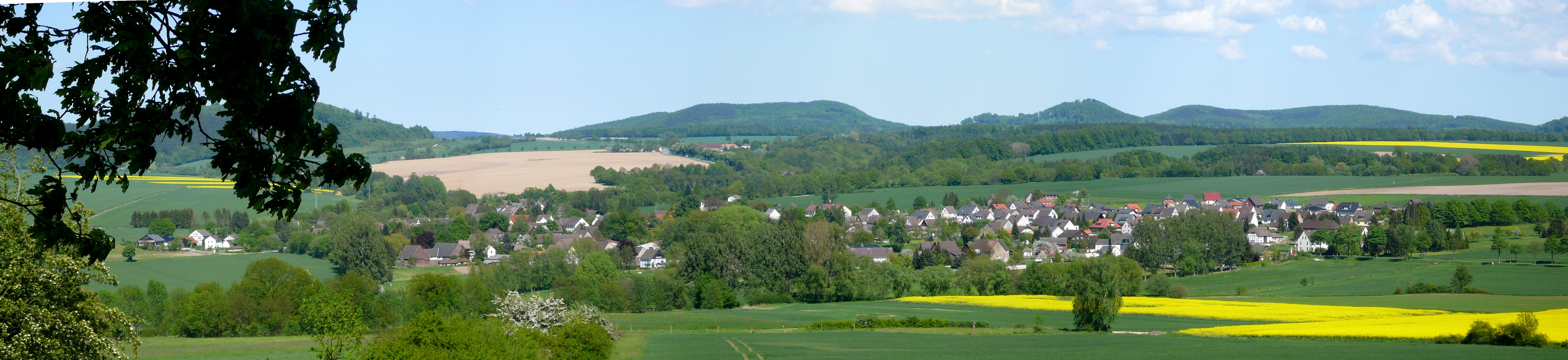 Blick von Südwesten vom unteren Hang des Kleinen Everstein auf Negenborn, Landkreis Holzminden